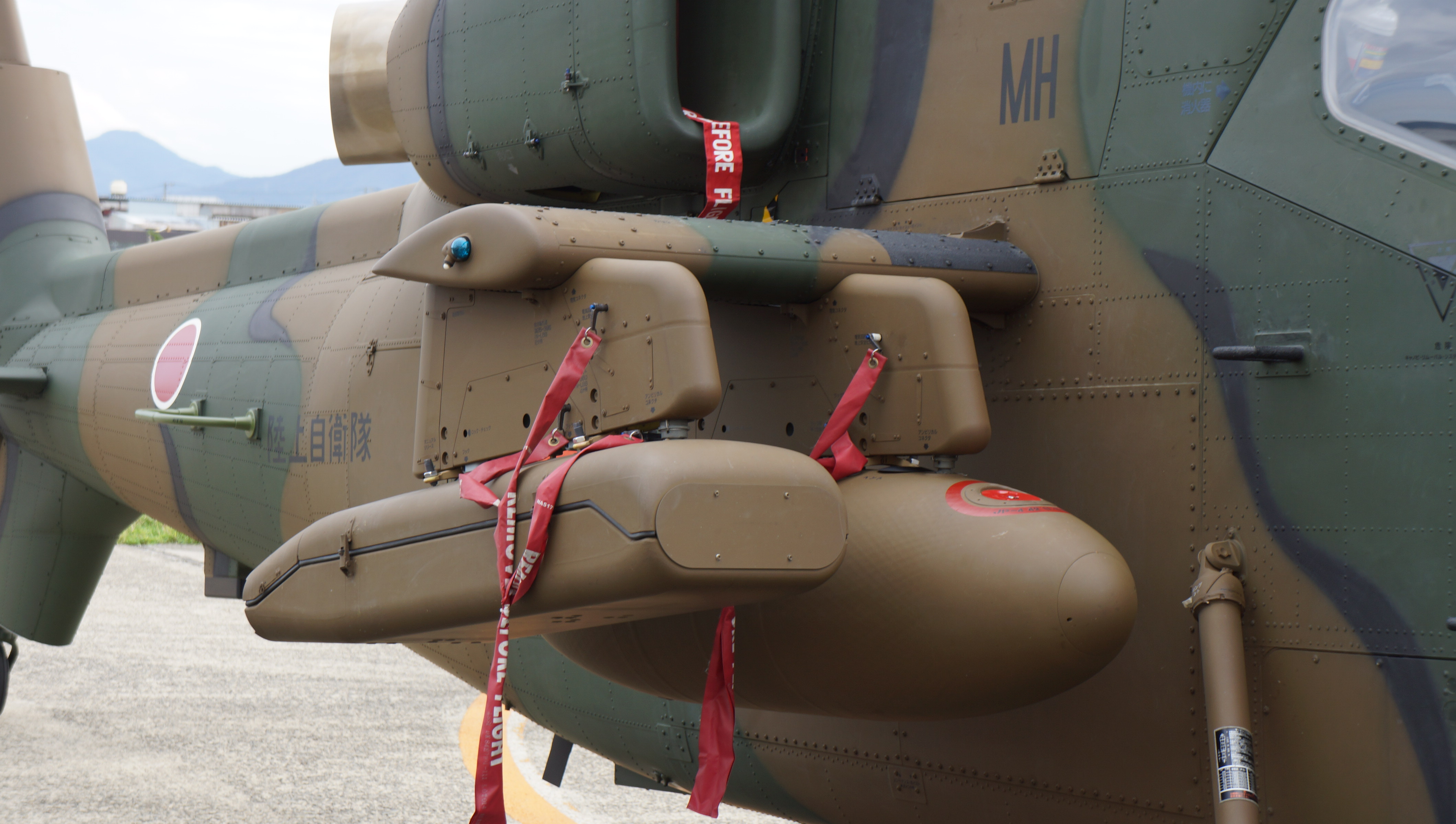 陸上自衛隊 OH-1偵察ヘリコプター 増槽とAAM。 12年10月6日 陸上自衛隊八尾駐屯地にて。